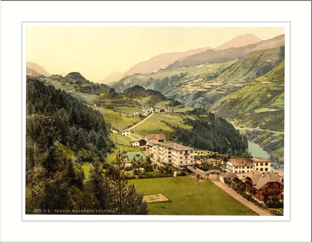 Lower Engadine Vulpera and Fetan Grisons Switzerland